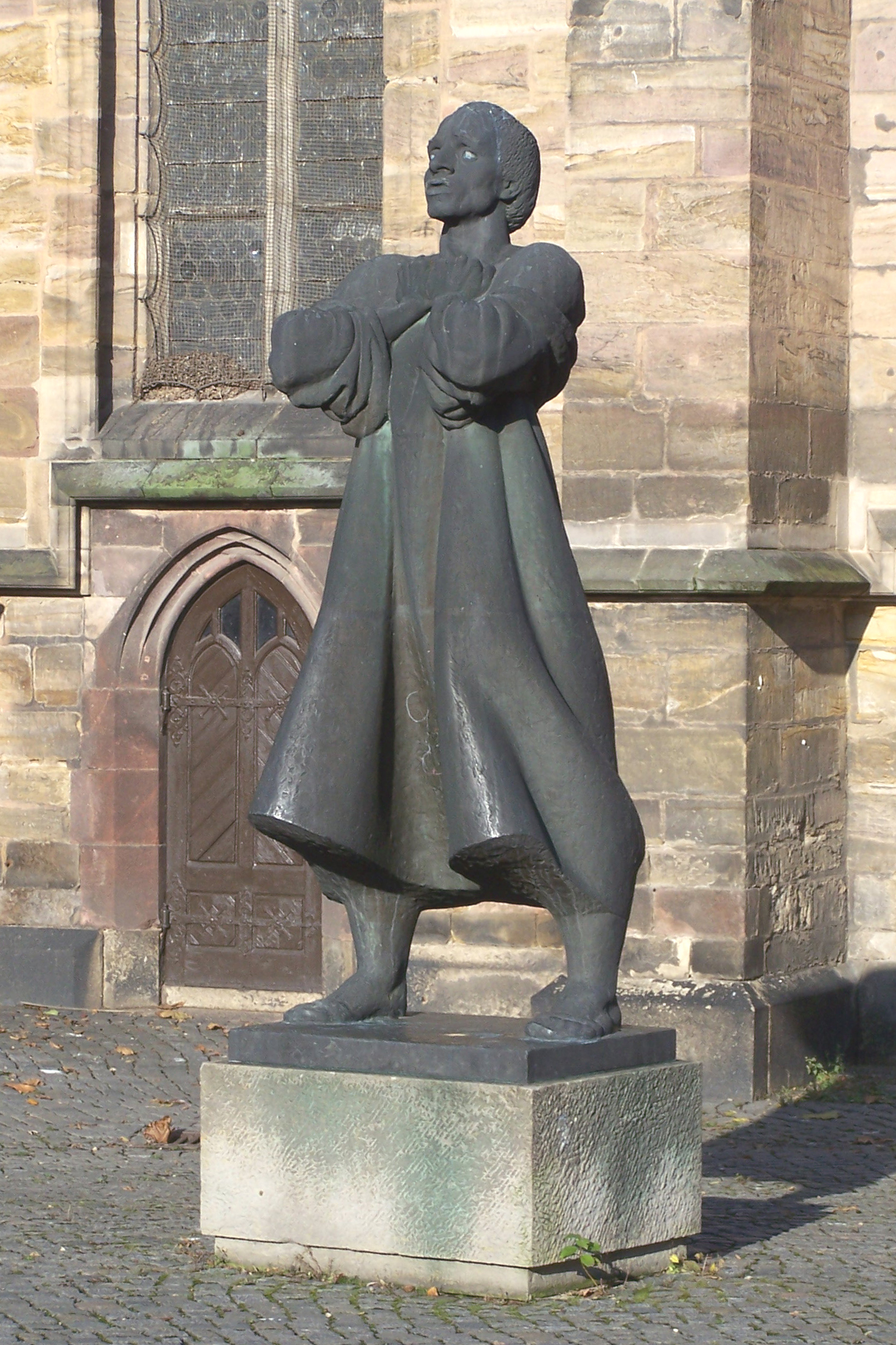 Thomas-Müntzer-Denkmal in Zwickau an der Katharinenkirche (mehr Infos)